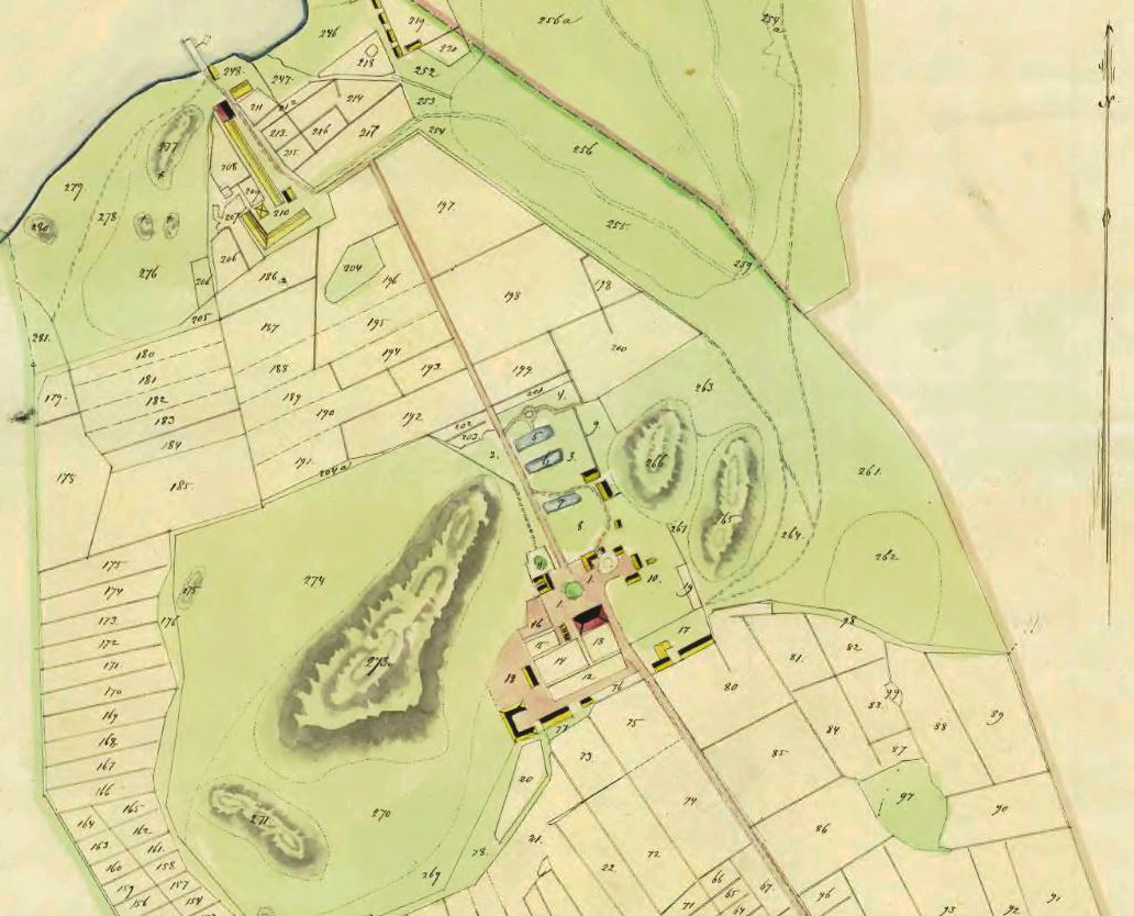 Karta visande Slagsta gård